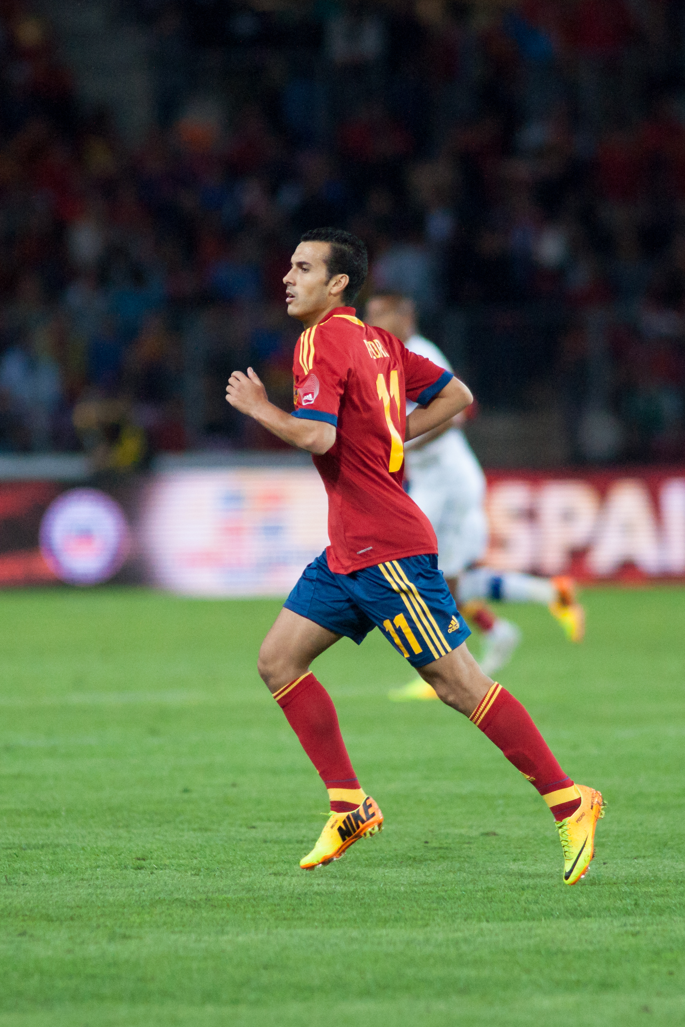 Espagne - Chili, 10 septembre 2013.